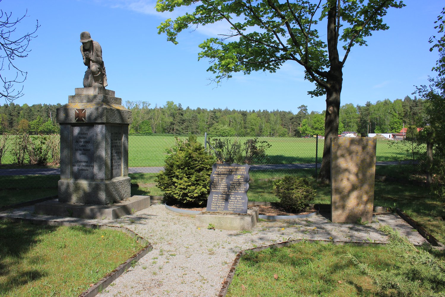 Hornjoserbsce: Wojerski pomnik a pomnik za stary kěrchow na (nowym) kěrchowje w Brězowce.